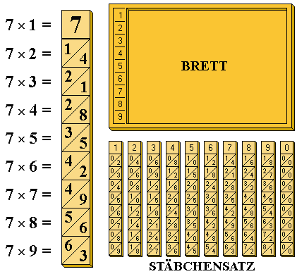 Napiersche Rechenstaebe